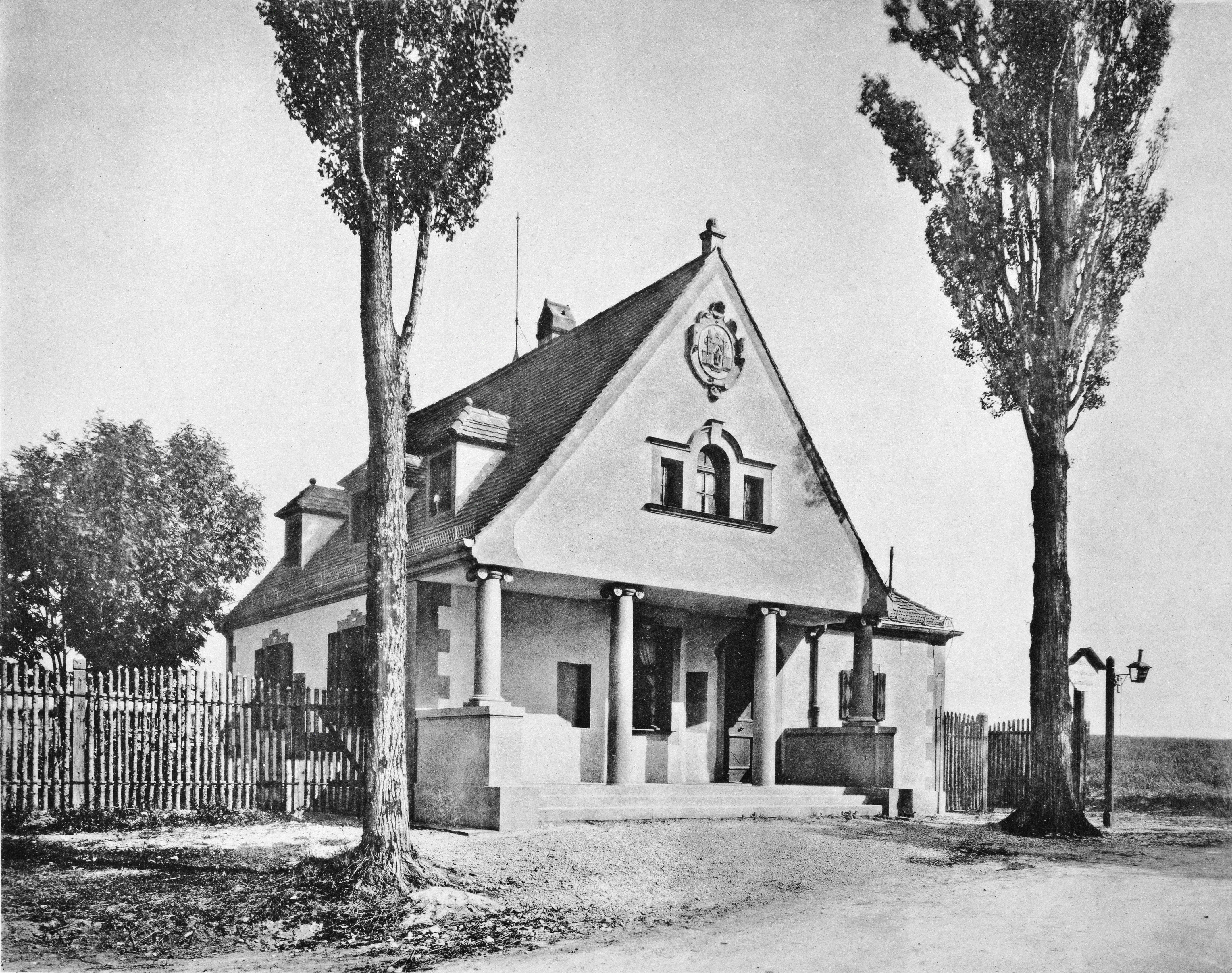 Zollstationsgebäude in Harlaching. Bauzeitlich Harlachinger Straße 1a. Höhenangabe im Jahr 1928, Bolzennummer 2116. 537, 242 Höhe ü.N.N. südwestliche Ecke des Erkeranbaues. Weitere bekannte Pflasterzollstationen im Jahr 1906; Großhesselohe - Bahnwärterposten 5. Tegernseerlandstraße 128. Ramersdorf 9 1/3. Berg-am Laim 60 1/4. Am Kirchstein 3. Zamdorf 15. Engelschalkingerweg 161. Oberföhring 61. Ungererstraße 19. Schwabingerlandstraße 36a. Belgradstraße 63. Schleißheimerstraße 216. Aeusser Dachauerstraße 150. Menzingerstraße 2. Nederlingerstraße 59. Fürstenriederstraße 14. Landsbergerstraße 363. Westendstraße 201. Forstenriederstraße 82. Wolfratshauserstraße 29 1/2. Benediktbeuererstraße 5a. Zenettistraße 1.